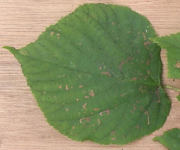 zelfgemaakte foto van door bastaardrups aangevreten bald van de Hollandse linde (Tilia × europaea): half september